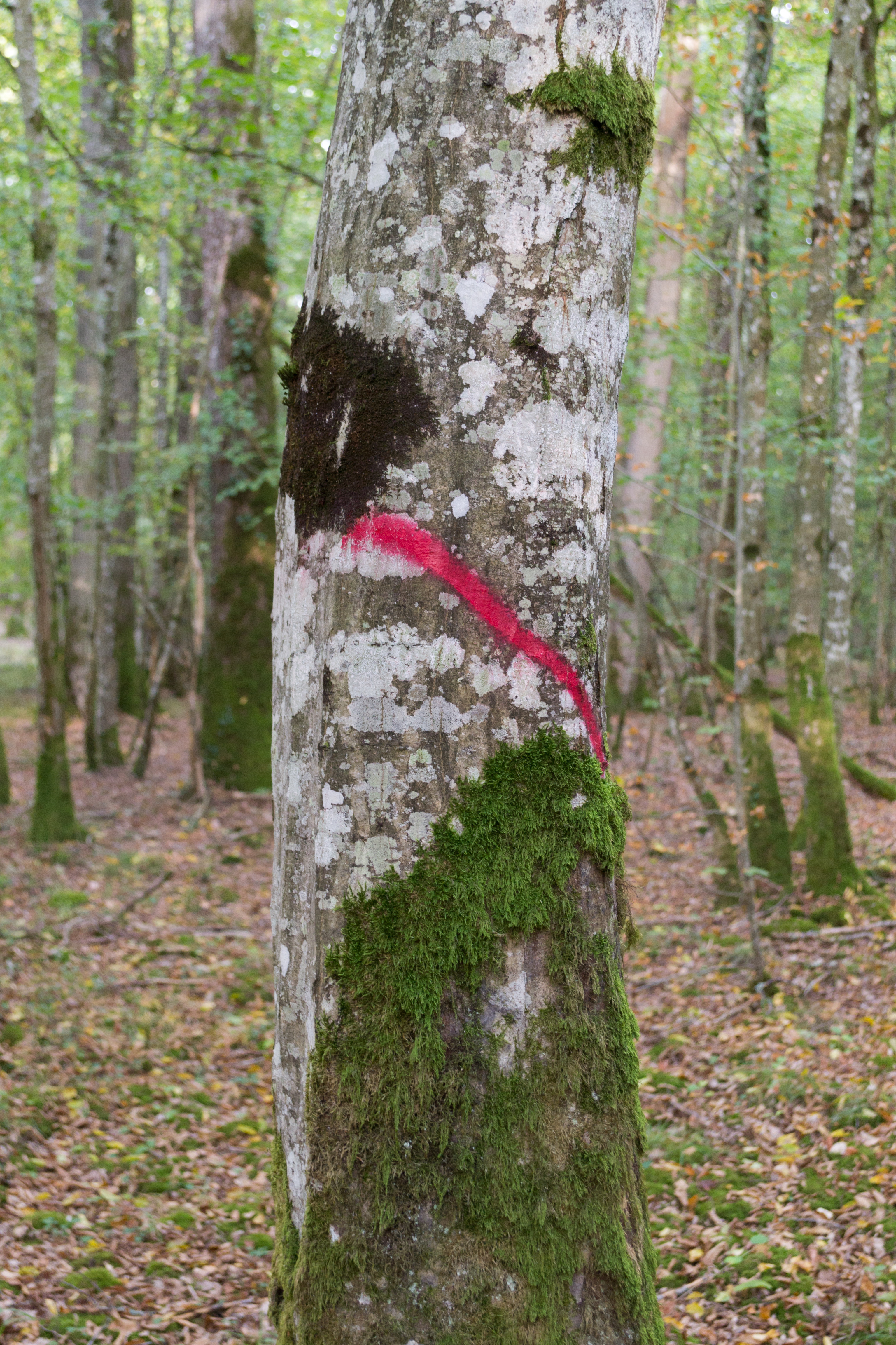 Petit bois de charme martelé à la peinture; le marquage d’un trait oblique, dans ce contexte, signifie que le bois est martelé à destination du bois énergie ou de la trituration